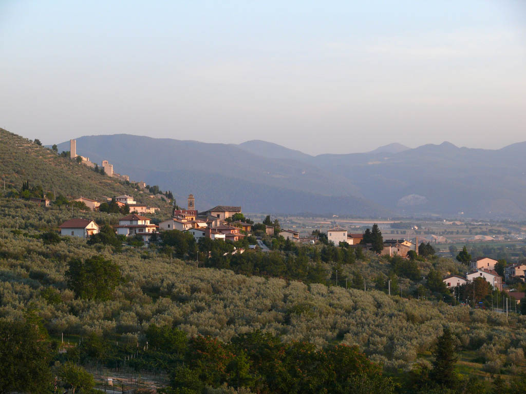 Pigge near Trevi